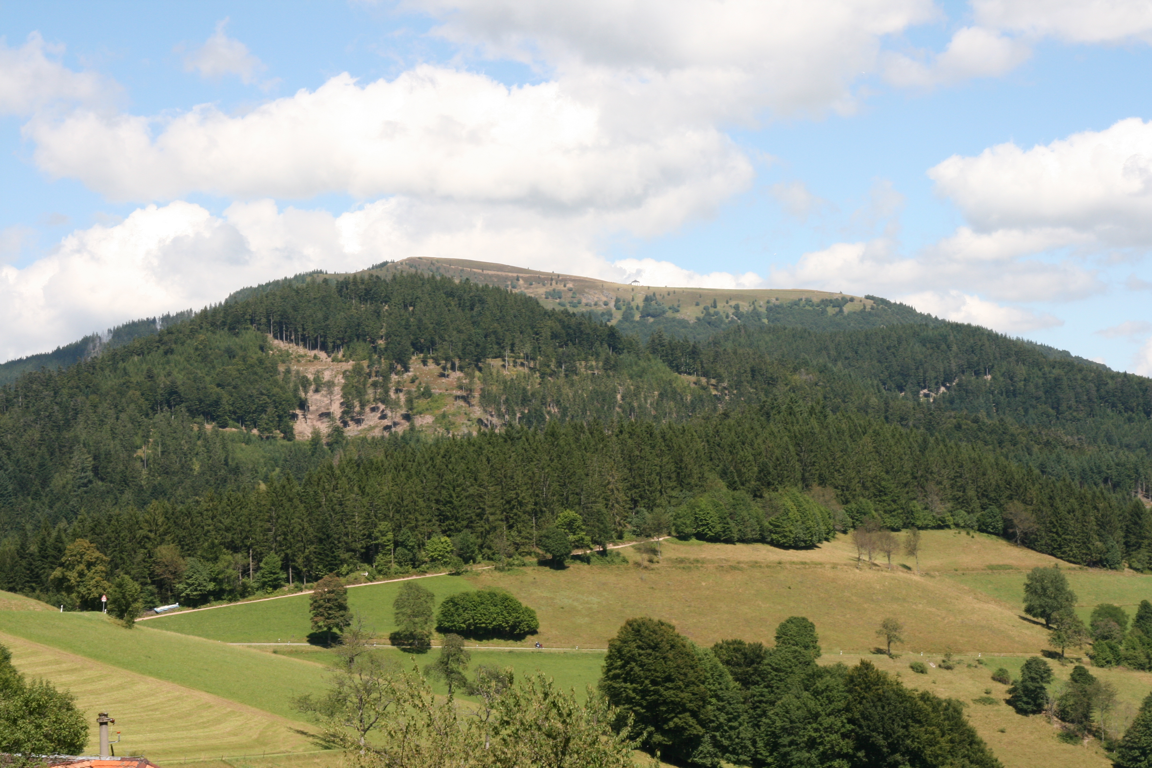 Belchen (Schwarzwald) von Heubronn/Neuenweg aus gesehen